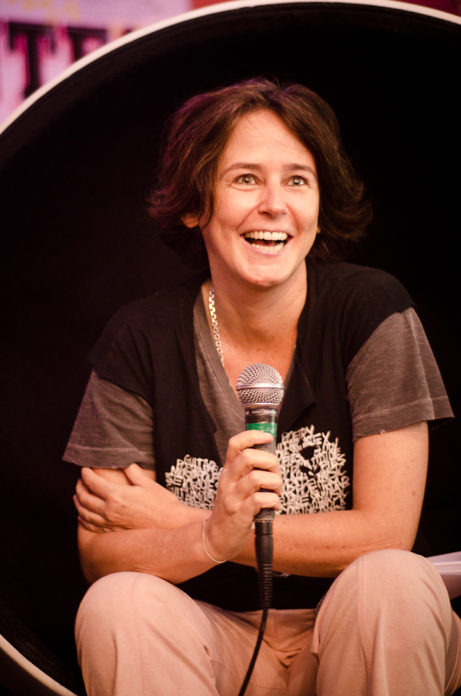 Milly Lacombe no Campus Party 2012. Foto: Rafael Vilela.